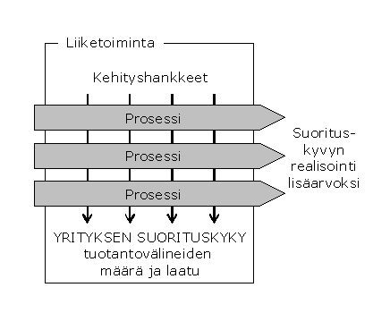 Horisontaalinen ja vertikaalinen ohjaus